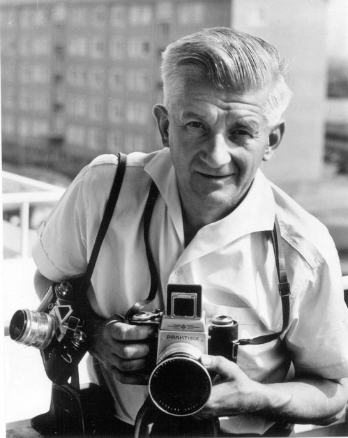 Portrait Erich Höhne